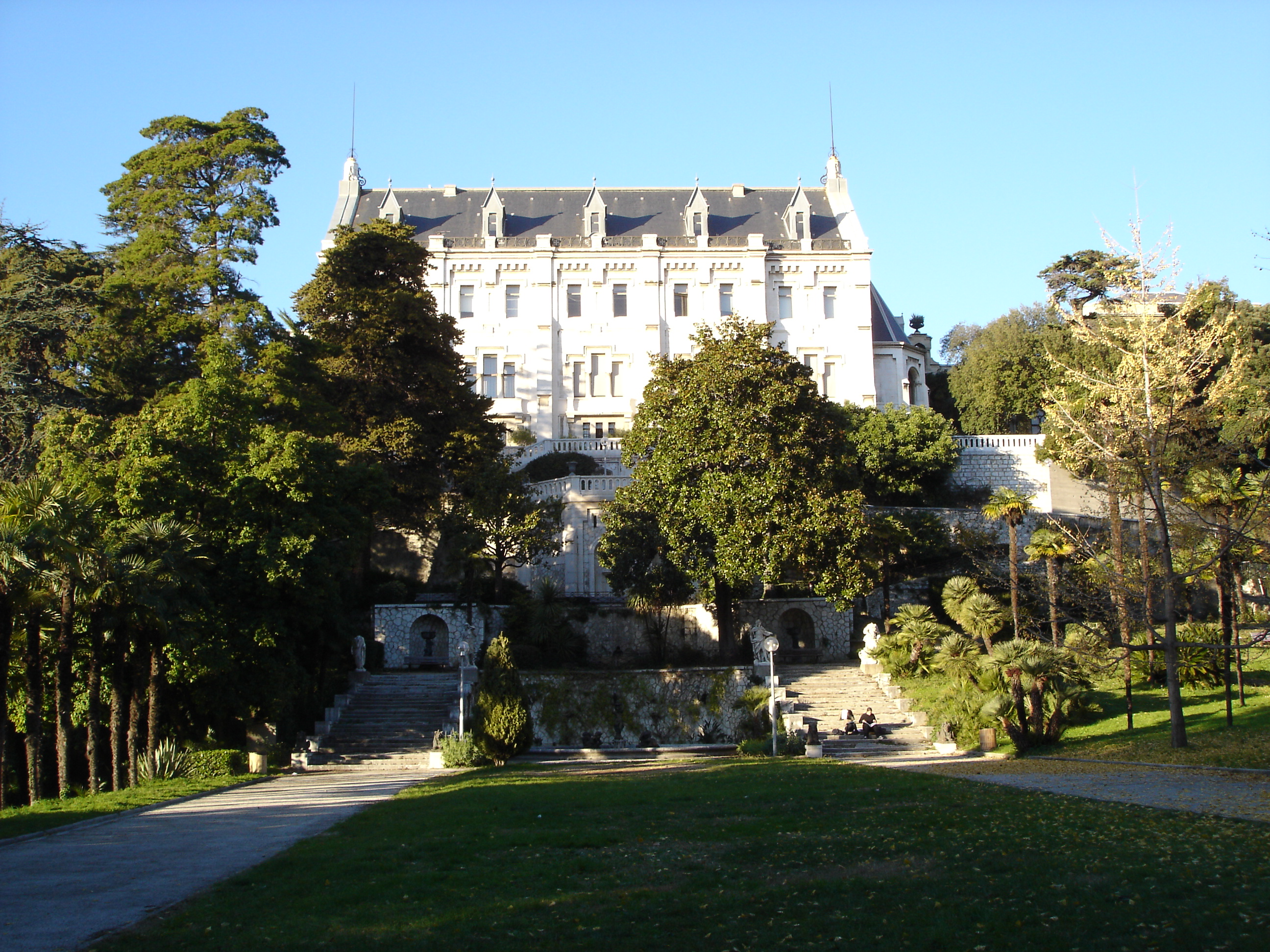 Le campus Valrose de Nice dans les Alpes maritimes